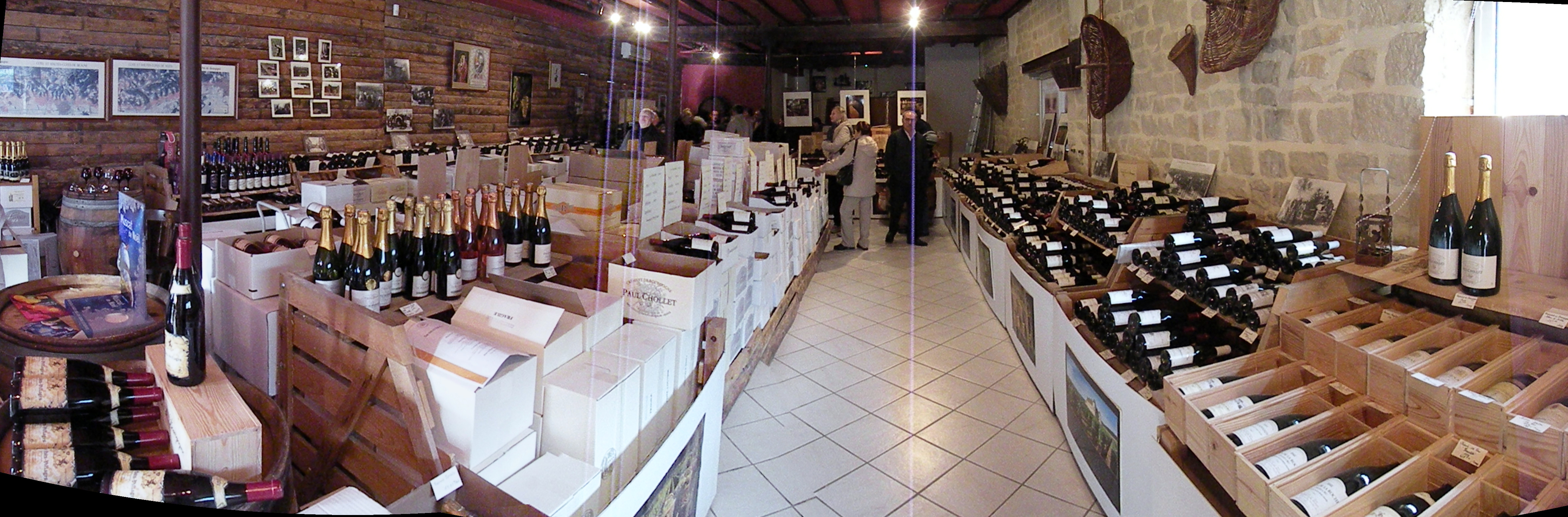 Дегустационный зал в Бургундии под Дижоном/ Bourgogne, France